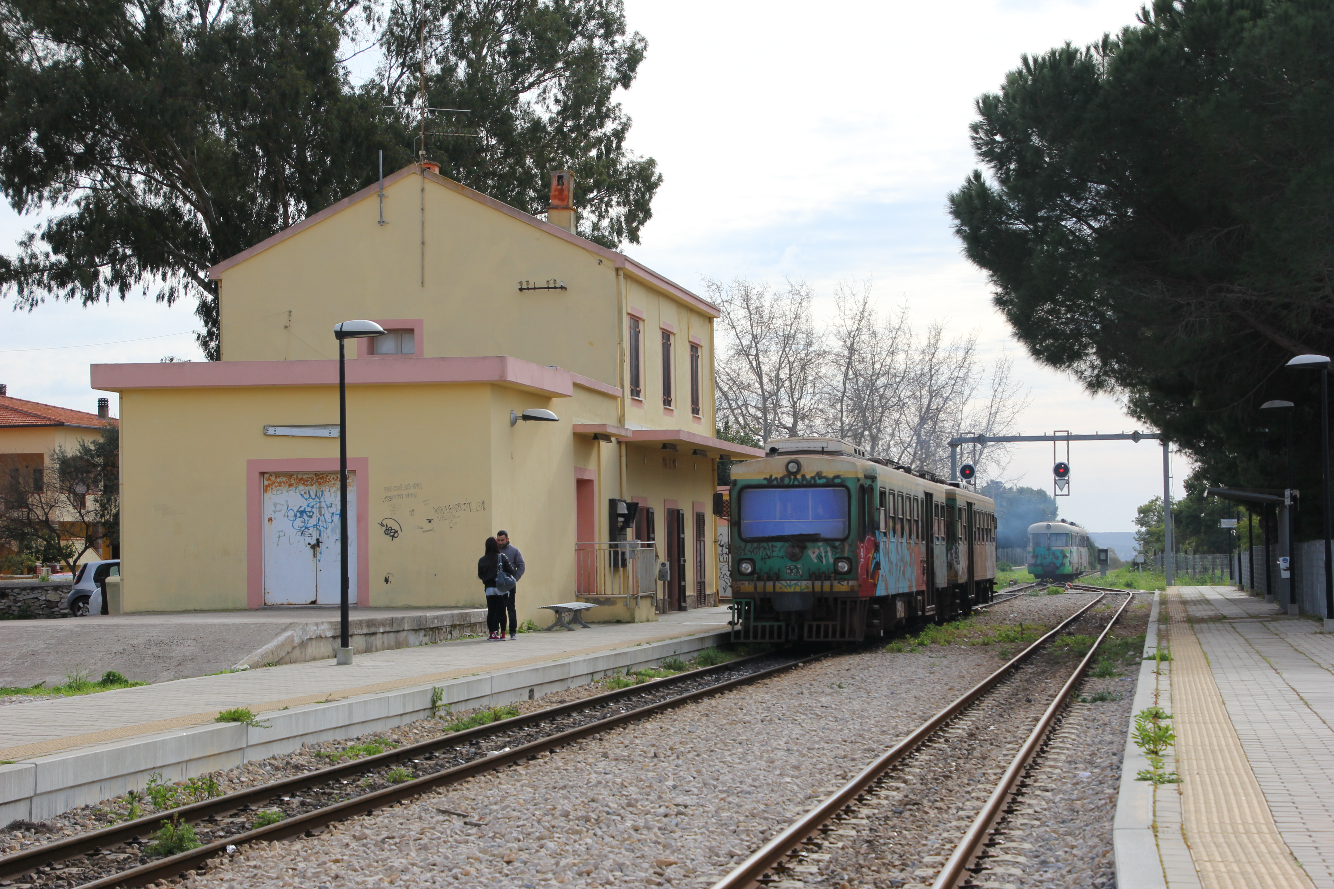 Olmedo - Stazione ferroviaria